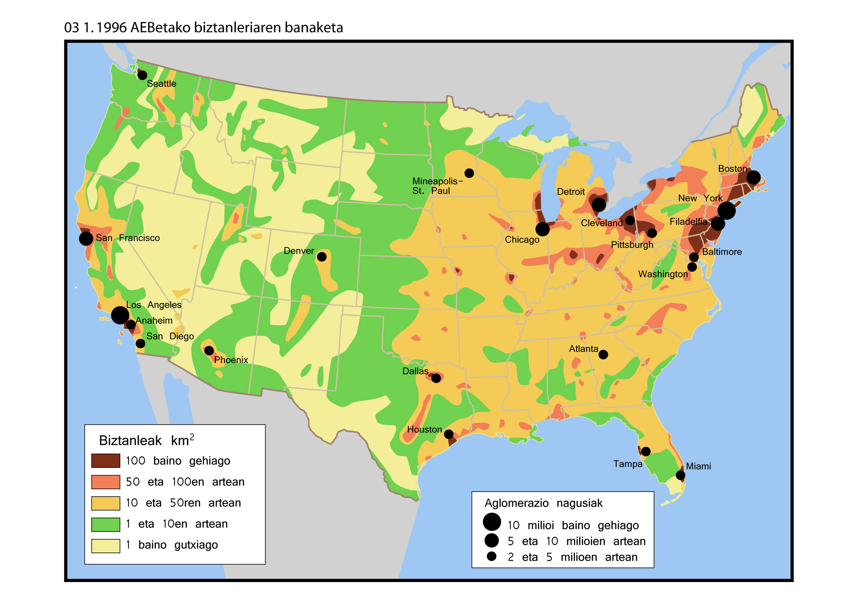 1996 AEBko biztanleriaren banaketa, , UEUren liburutik hartua.